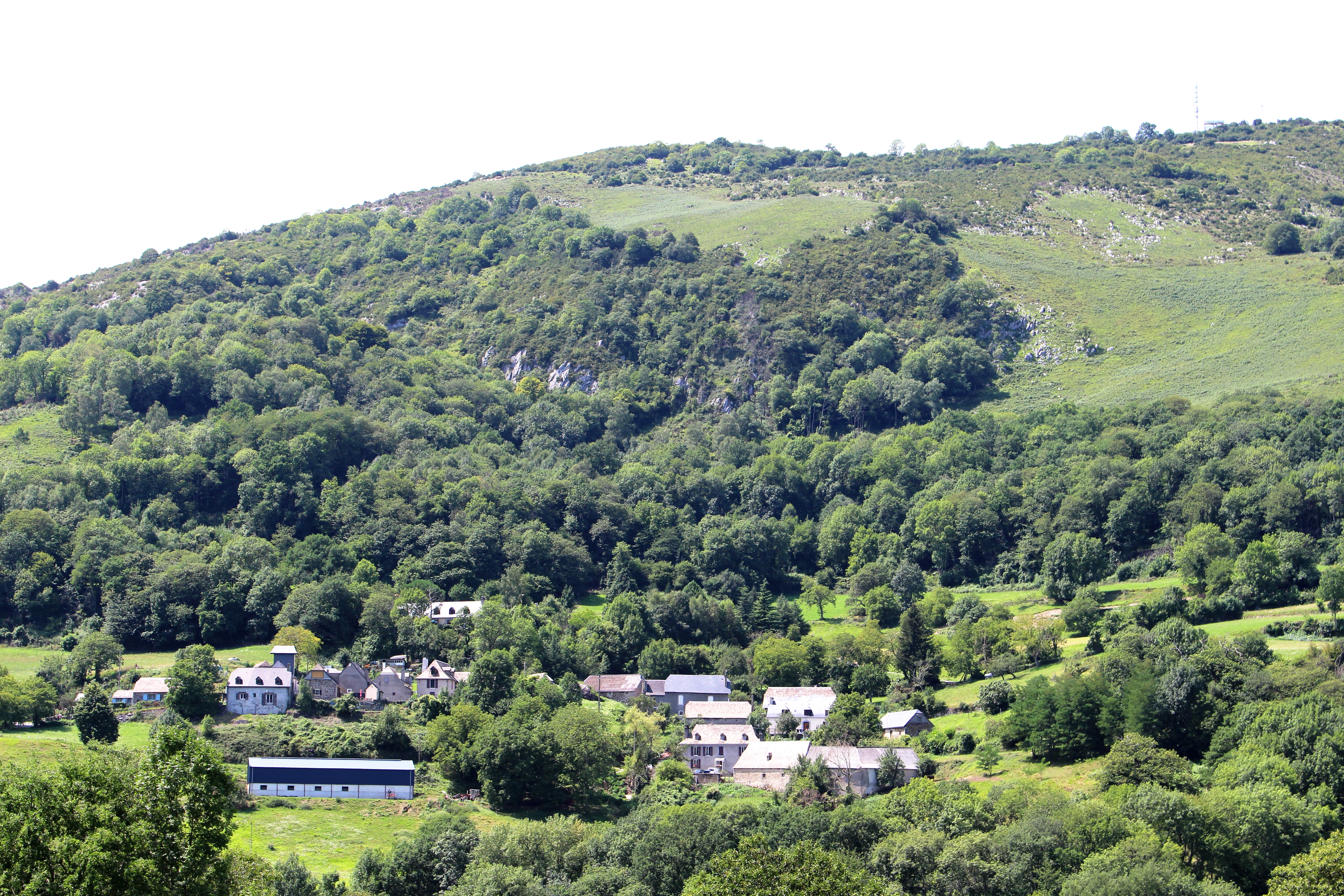 Jarret (Hautes-Pyrénées)